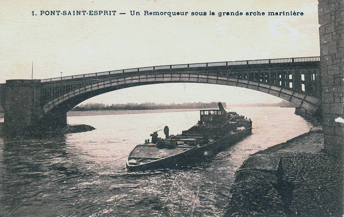 Un remorqueur sous la grande arche marinière